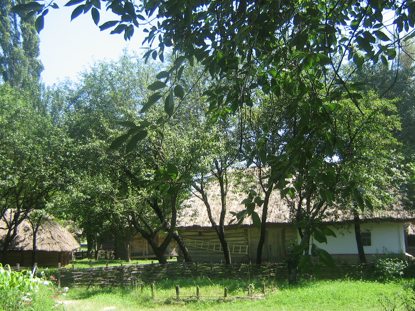 Національний музей народної архітектури і побуту України (с. Пирогів), Київ, Червонопрапорна вул., с. Пирогів